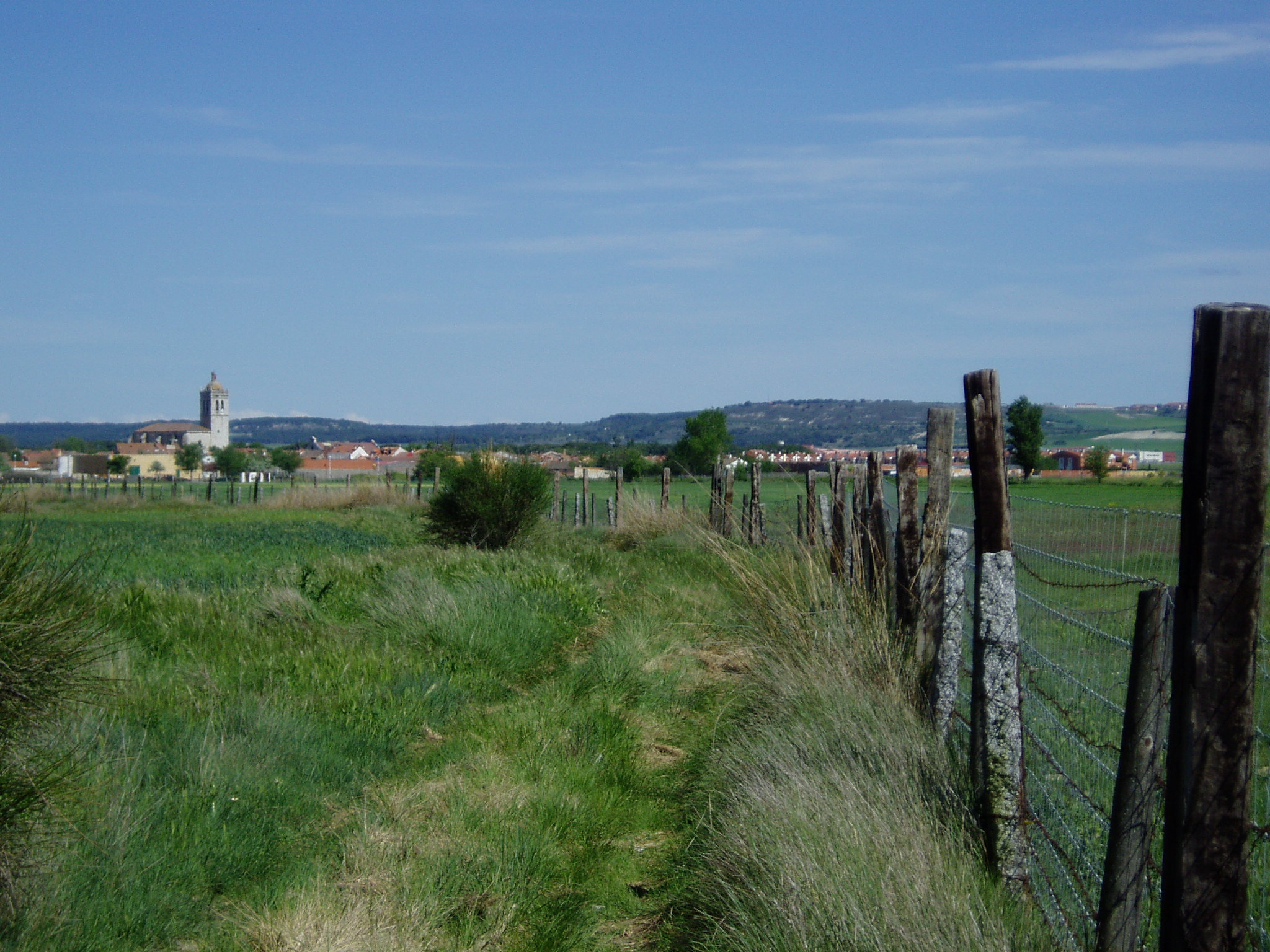 Salgüeros de Aldeamayor This is a photography of a Site of Community Importance in Spain with the ID: ES4180124. Natura2000 entry, EEA entry